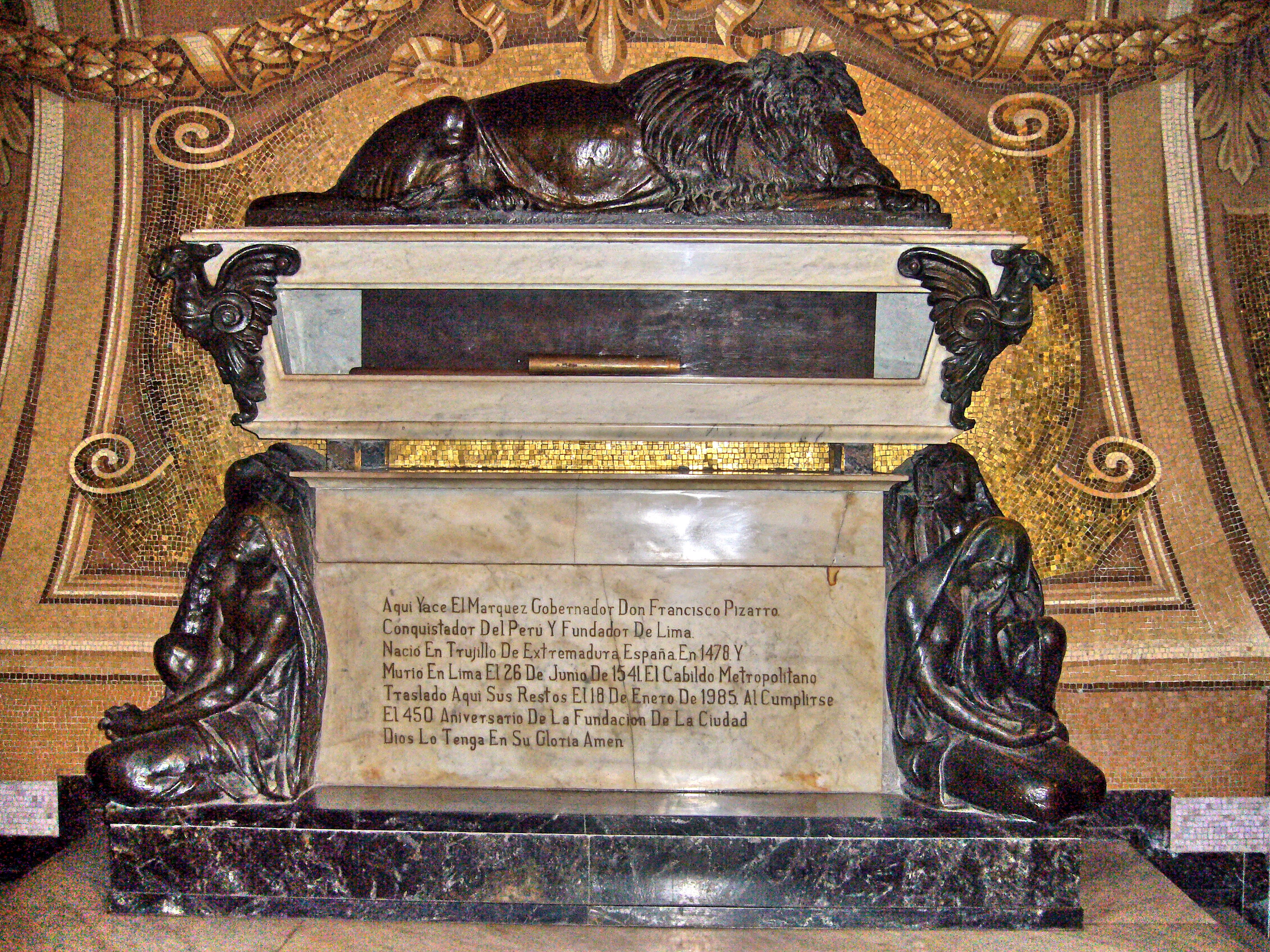 Descripción: Tumba de Francisco Pizarro Ubicación: Catedral de Lima País : Perú Fotógrafo: Manuel González Olaechea y Franco Fecha de la foto : 11 de julio de 2007